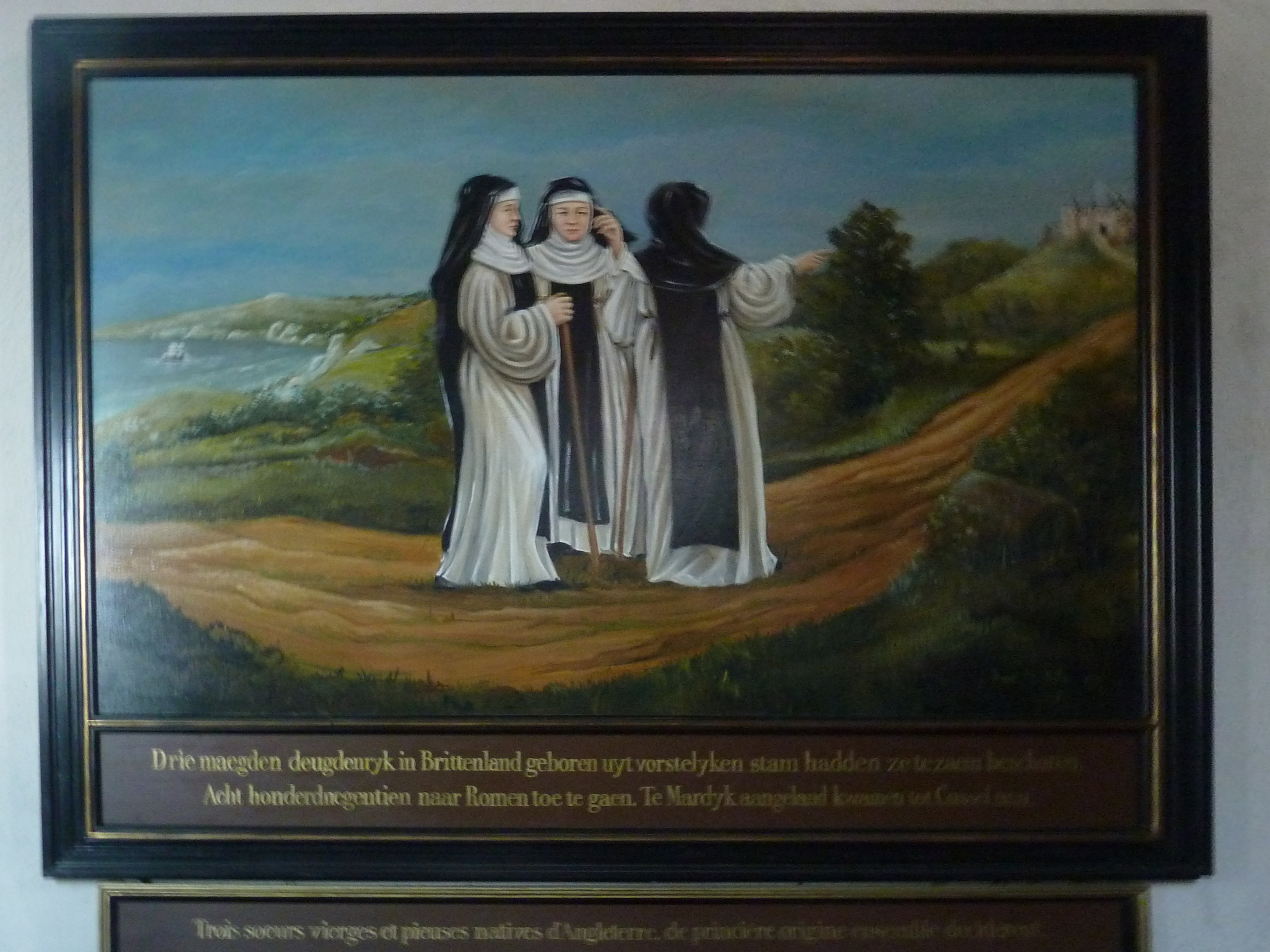 Tableau des "Trois Vierges" dans la chapelle des 3 vierges Caëstre, Nord, France